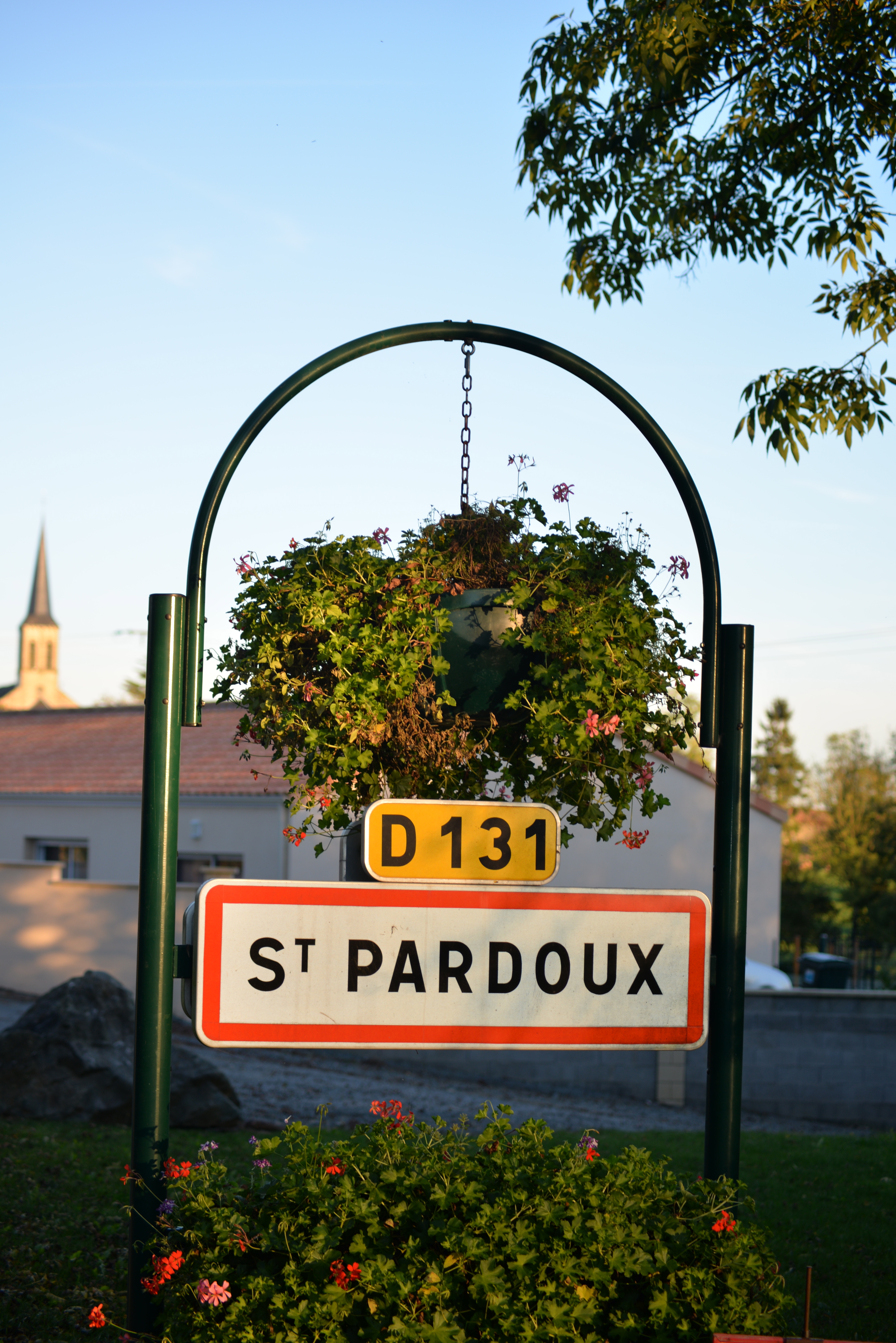 la pancarte d'entrée de bourg